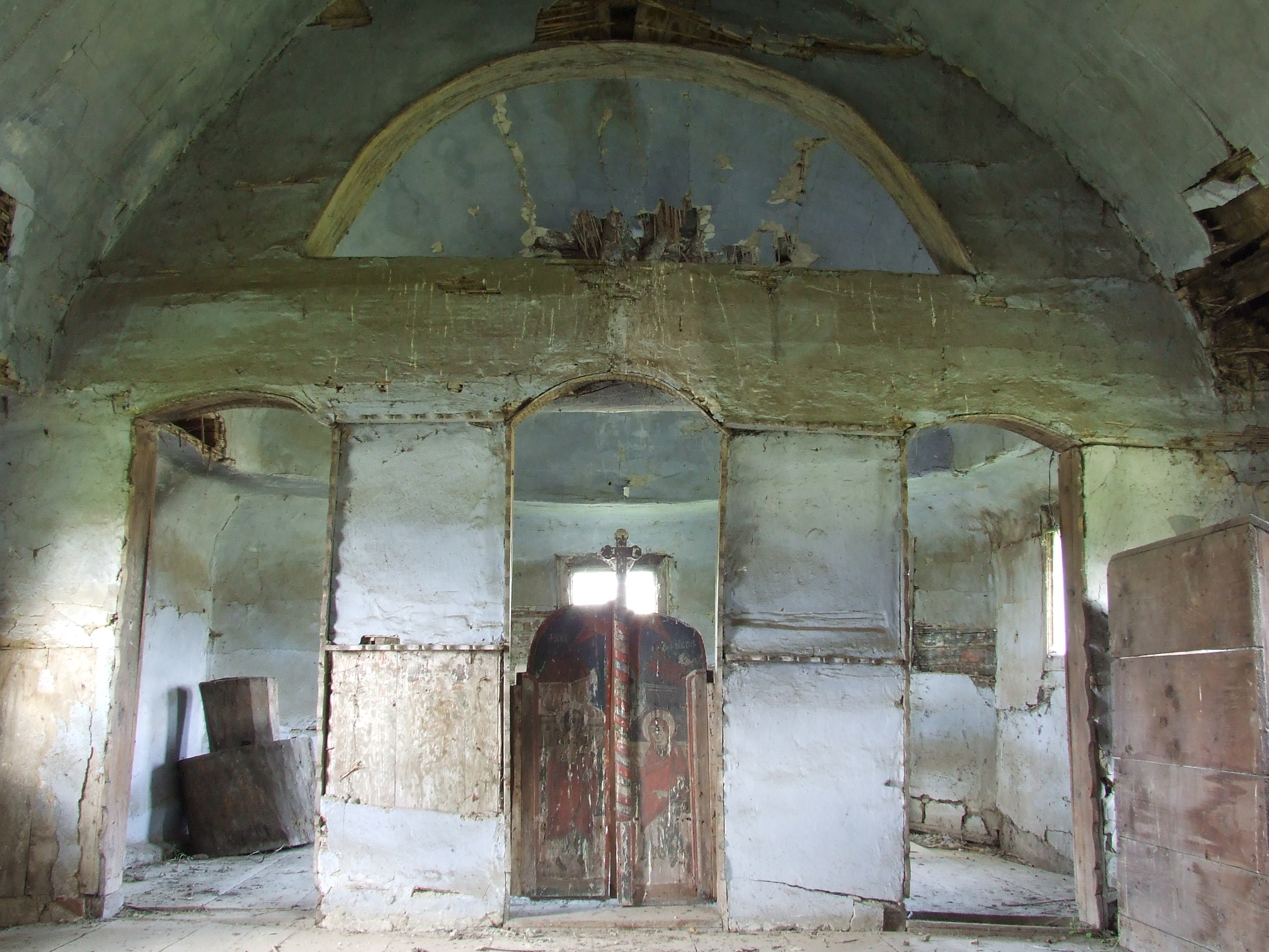 Biserica de lemn din Broşteni, judeţul Sibiu.